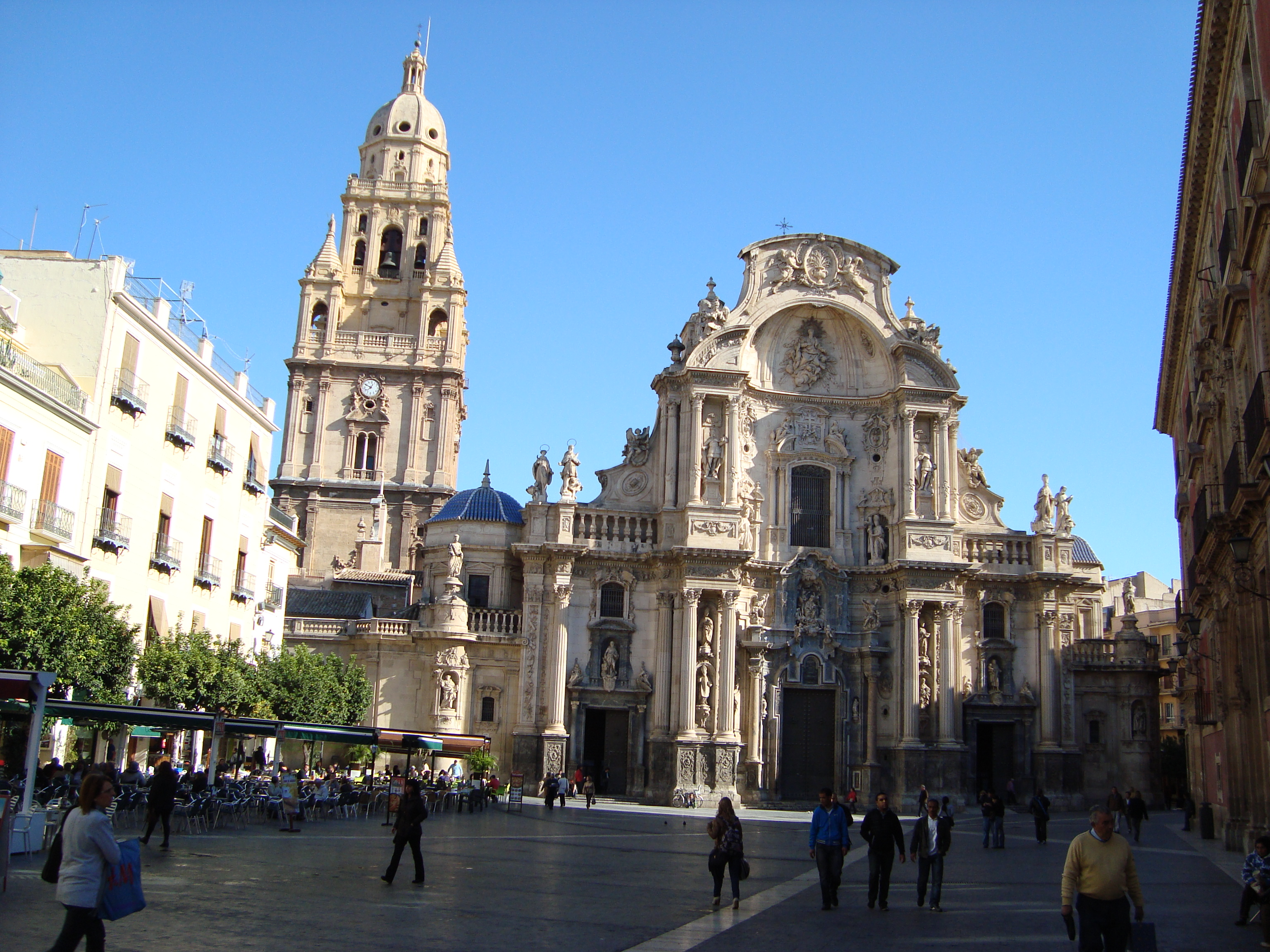 Plaza del Cardenal Belluga, Murcia